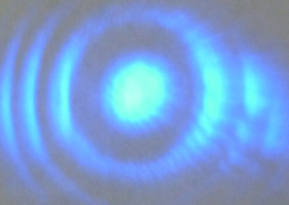 Interferenzmuster eines blauen Diodenlasers